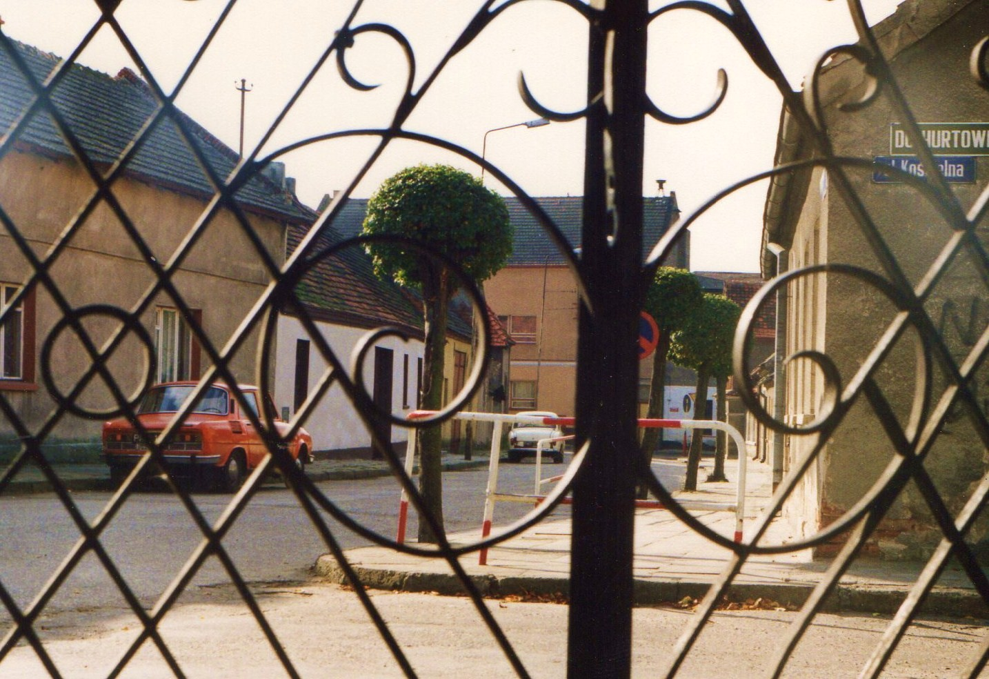 Pejzaż miejski z Ostroroga, 1993r.